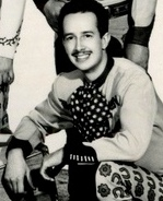 Rubén Fuentes Gassón violinista clásico y compositor mexicano. Integrante de la tercera generación del Mariachi Vargas de Tecalitlán (1950).